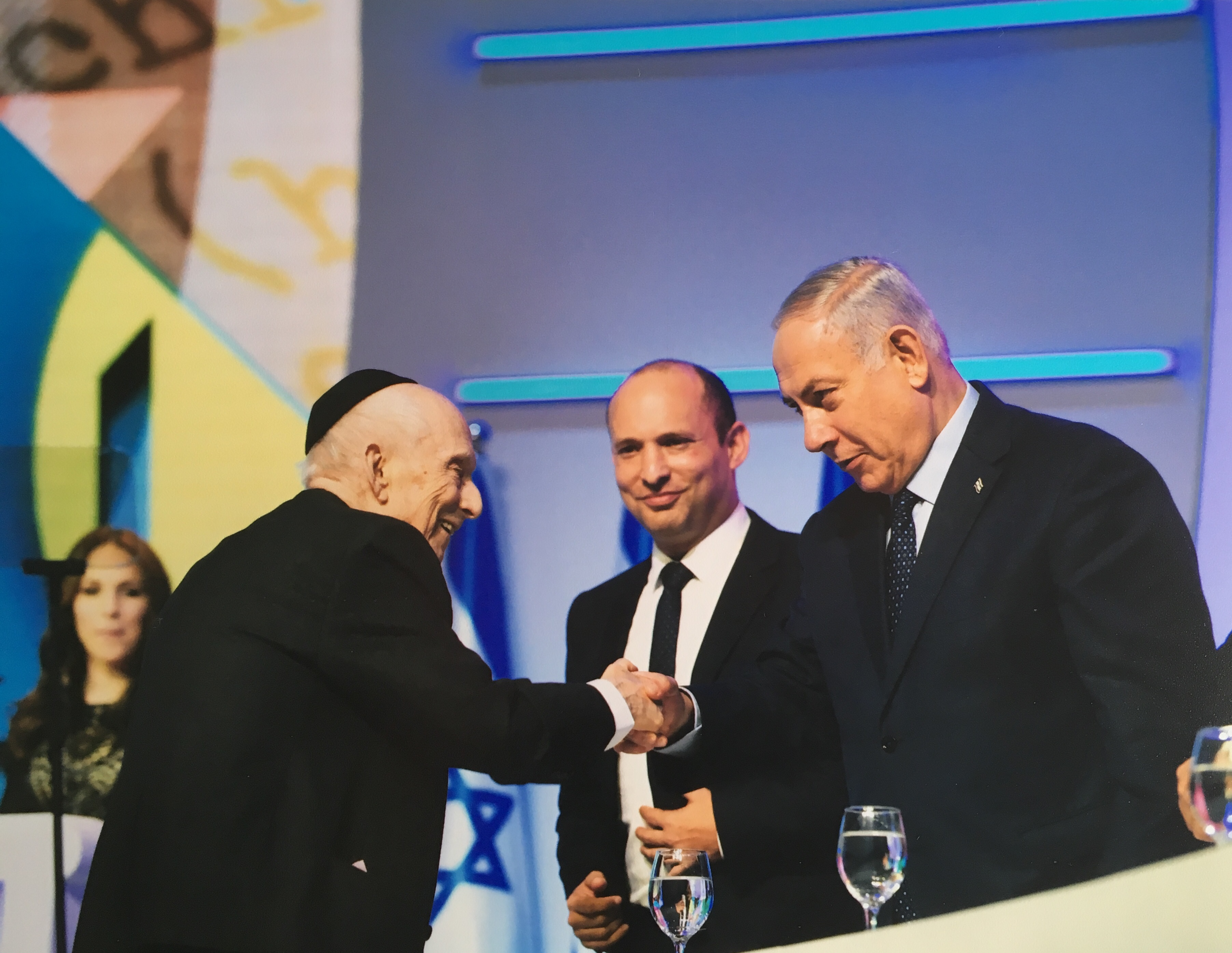 שלזינגר פרס ישראל